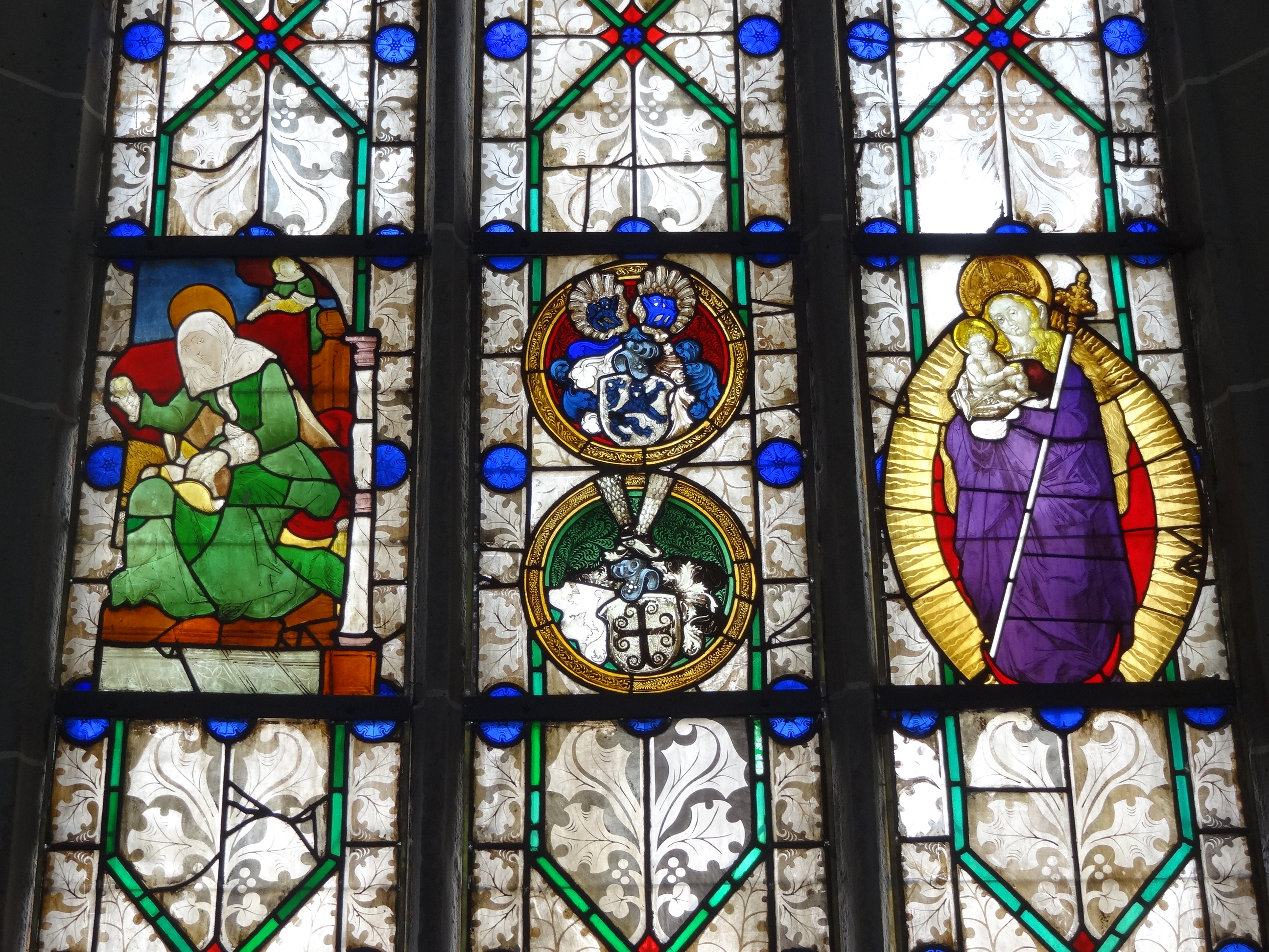 Marienstiftskirche Lich